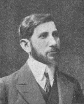 Charles Maurras, vers 1908.